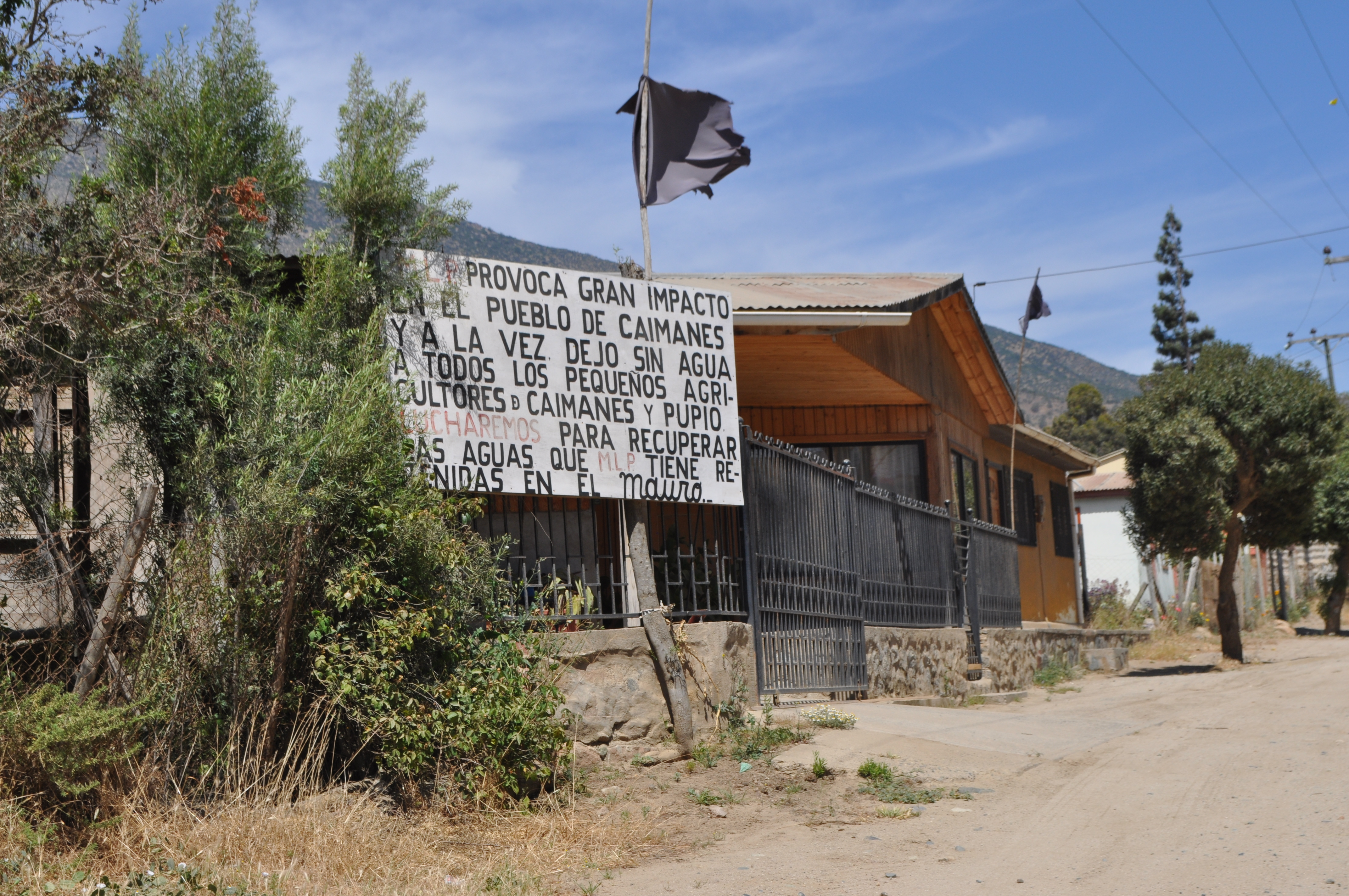 Carteles de protesta contra el tranque de relaves El Mauro de la Compañía Minera Los Pelambres (MLP) en una vivienda de la localidad de Caimanes, Región de Coquimbo, Chile.